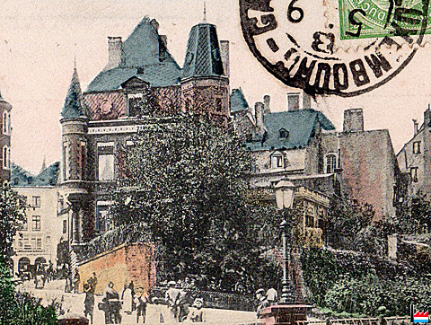 Bank Werling, Lambert & Cie, St. Michelsstrasse 1, um 1903 (extrait d'une carte postale)